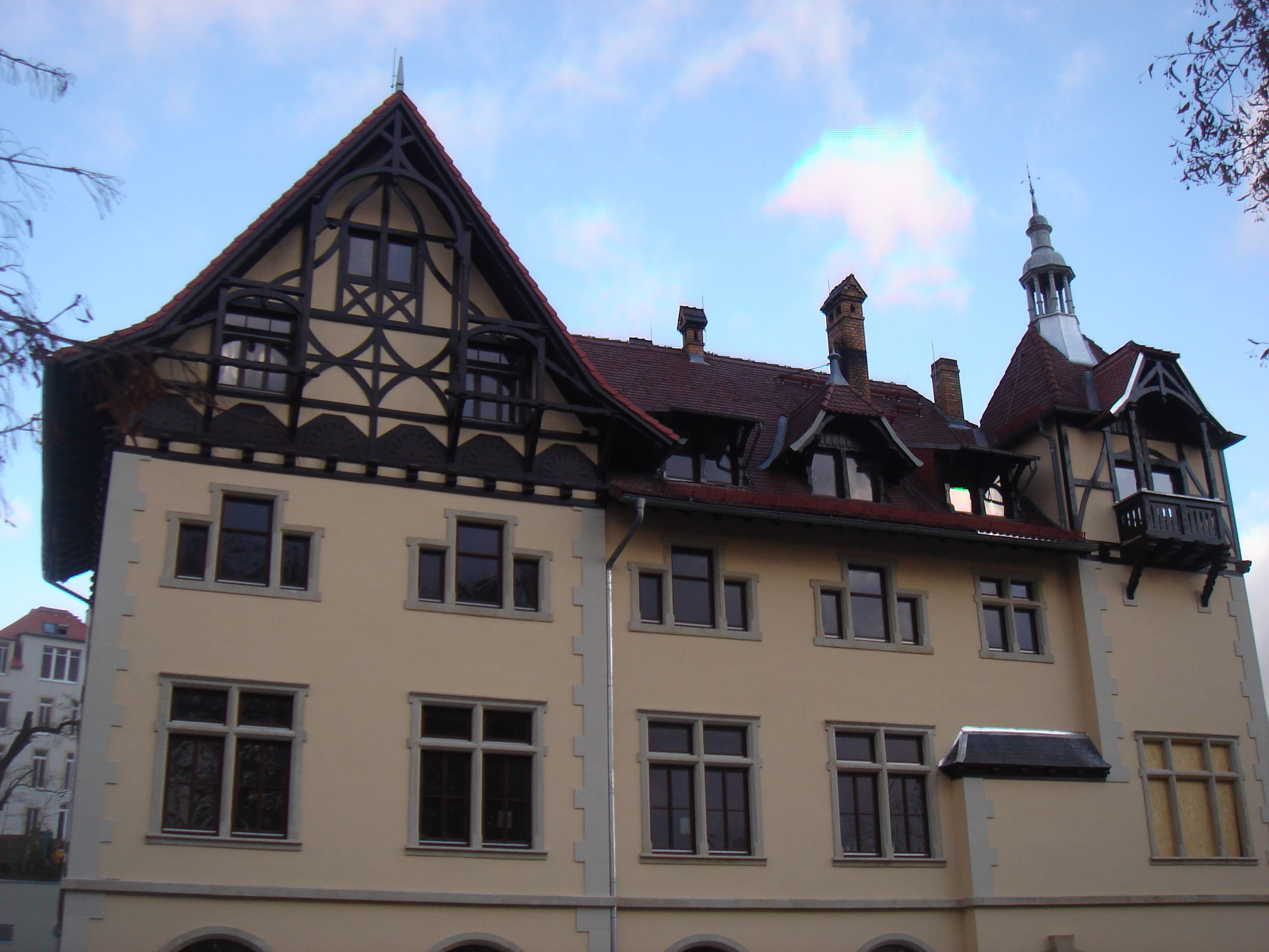 Ehemaliges Gasthaus Wilder Mann